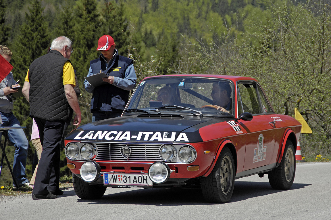 Lancia Fulvia 1600HF, 2.Serie bei der Wachau Classic 2007